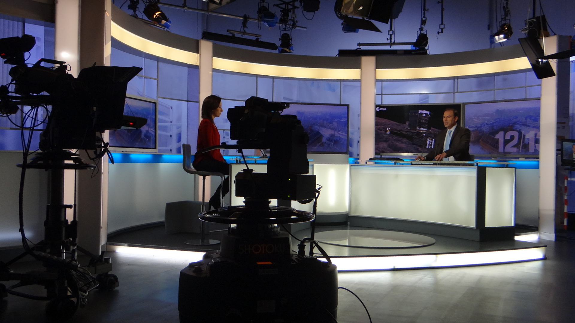 FR3 Nord Pas-de-Calais - le Journal télévisé de Virna Sacchi et Vincent Dupire - moyen technique à gauche le prompteur au centre caméra robotisée